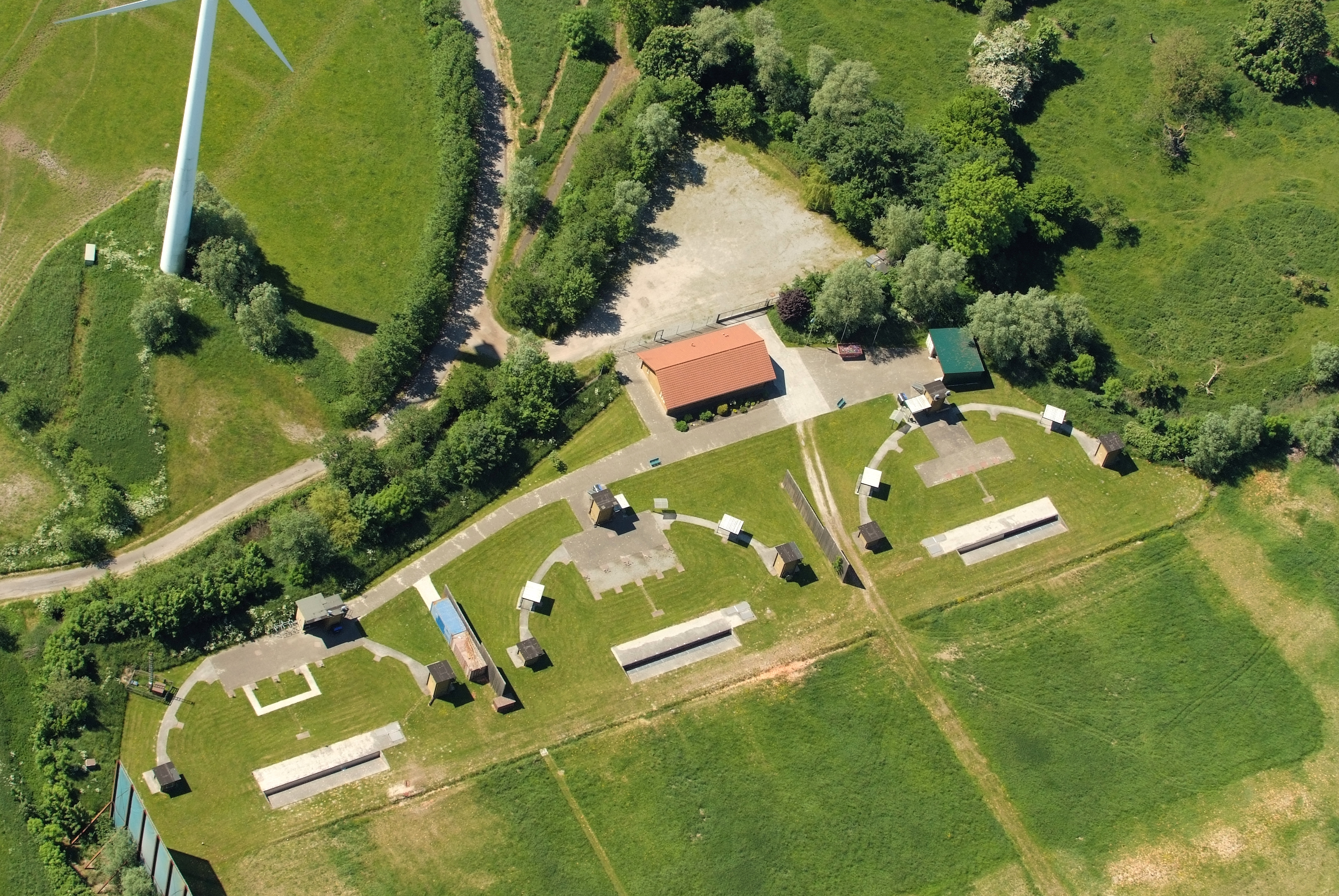 Fotoflug vom Flugplatz Nordholz-Spieka über Cuxhaven und Wilhelmshaven Dieses Bild zeigt den Wurfscheibenschießplatz in Sengwarden.